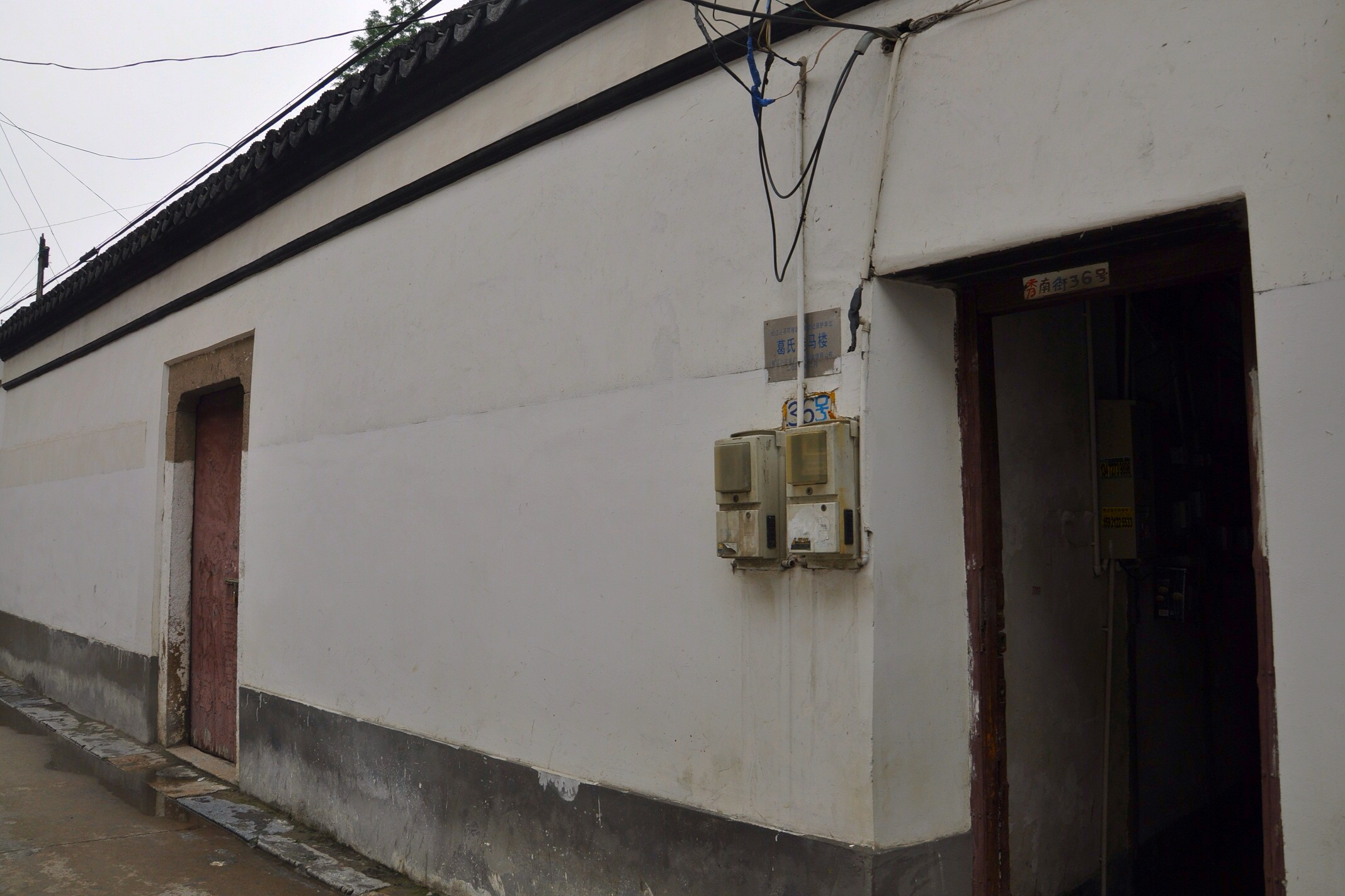 葛氏走马楼 永丰街道秀南街36号